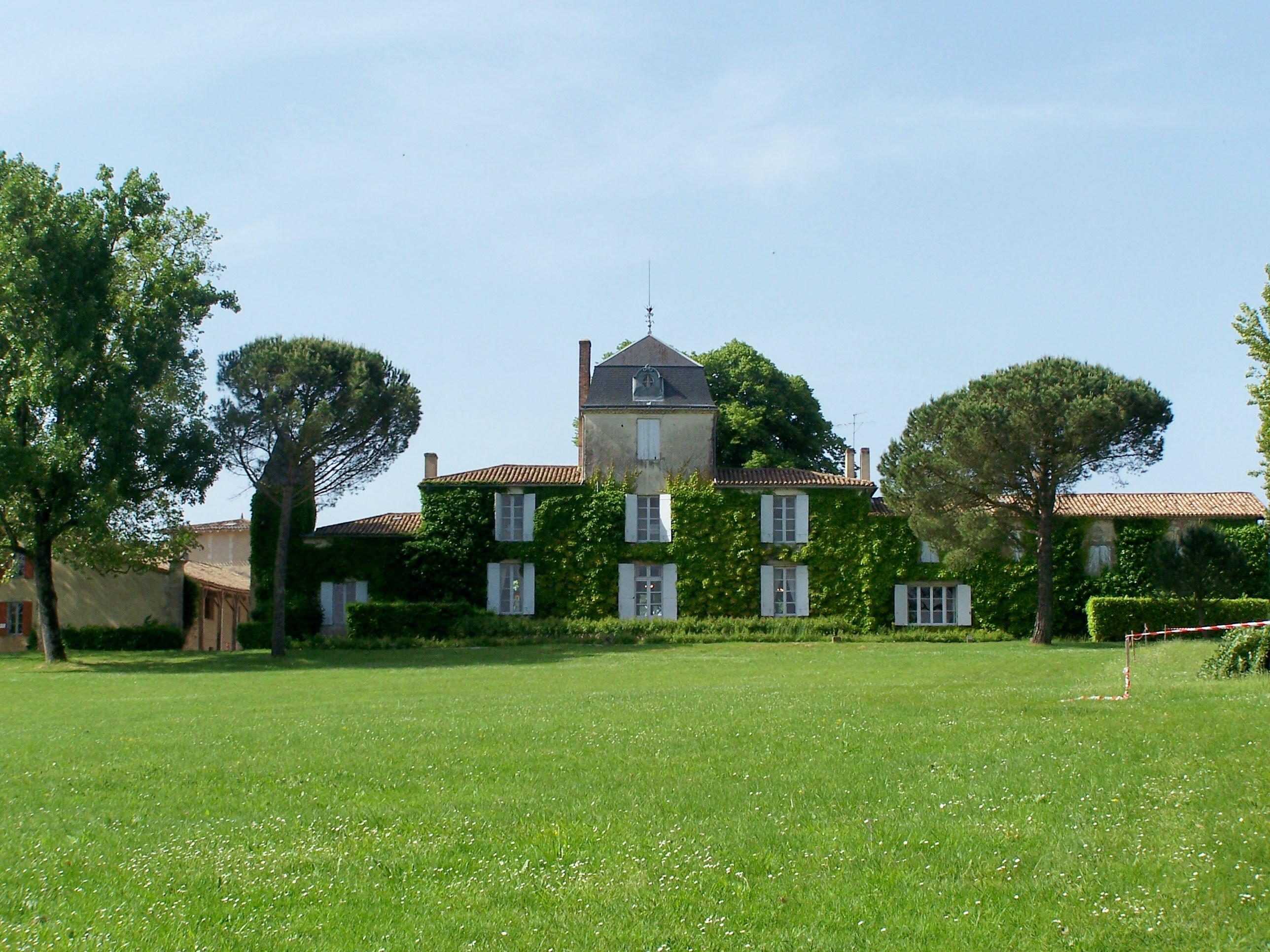 Le domaine de Malagar à Saint-Maixant, Gironde, France, propriété de François Mauriac